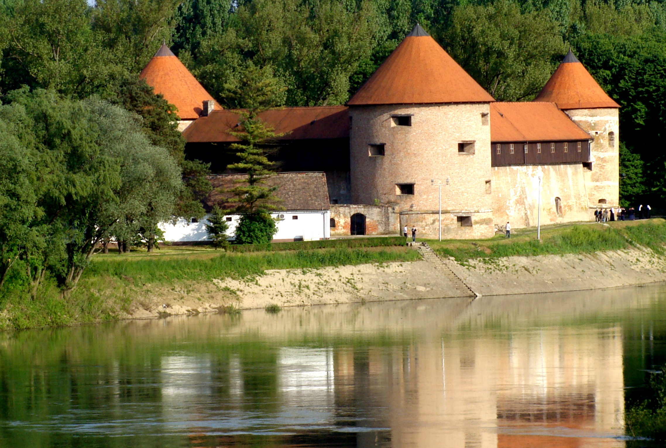 Sisak, Croatia